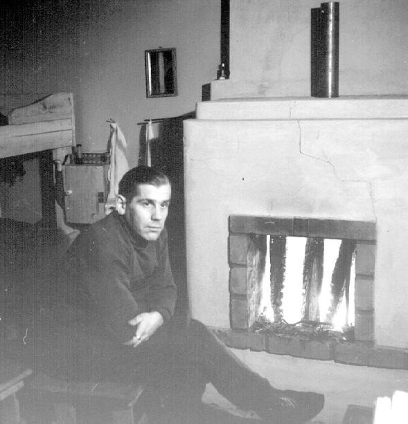 Näyttelijä Pentti Irjala takkatulen ääressä.